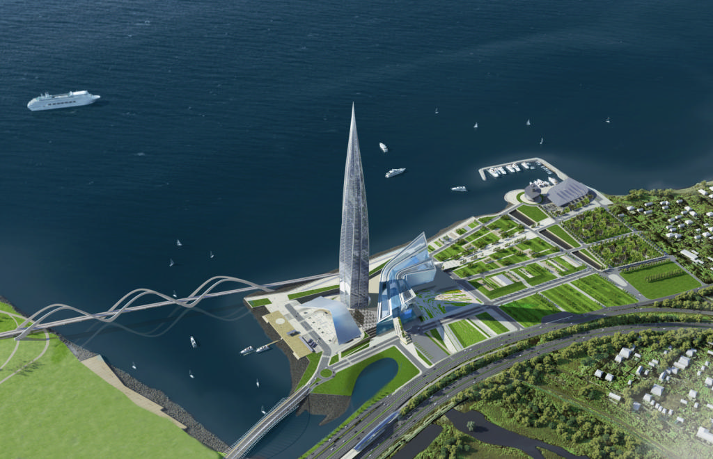 визуализации проекта Лахта-центр